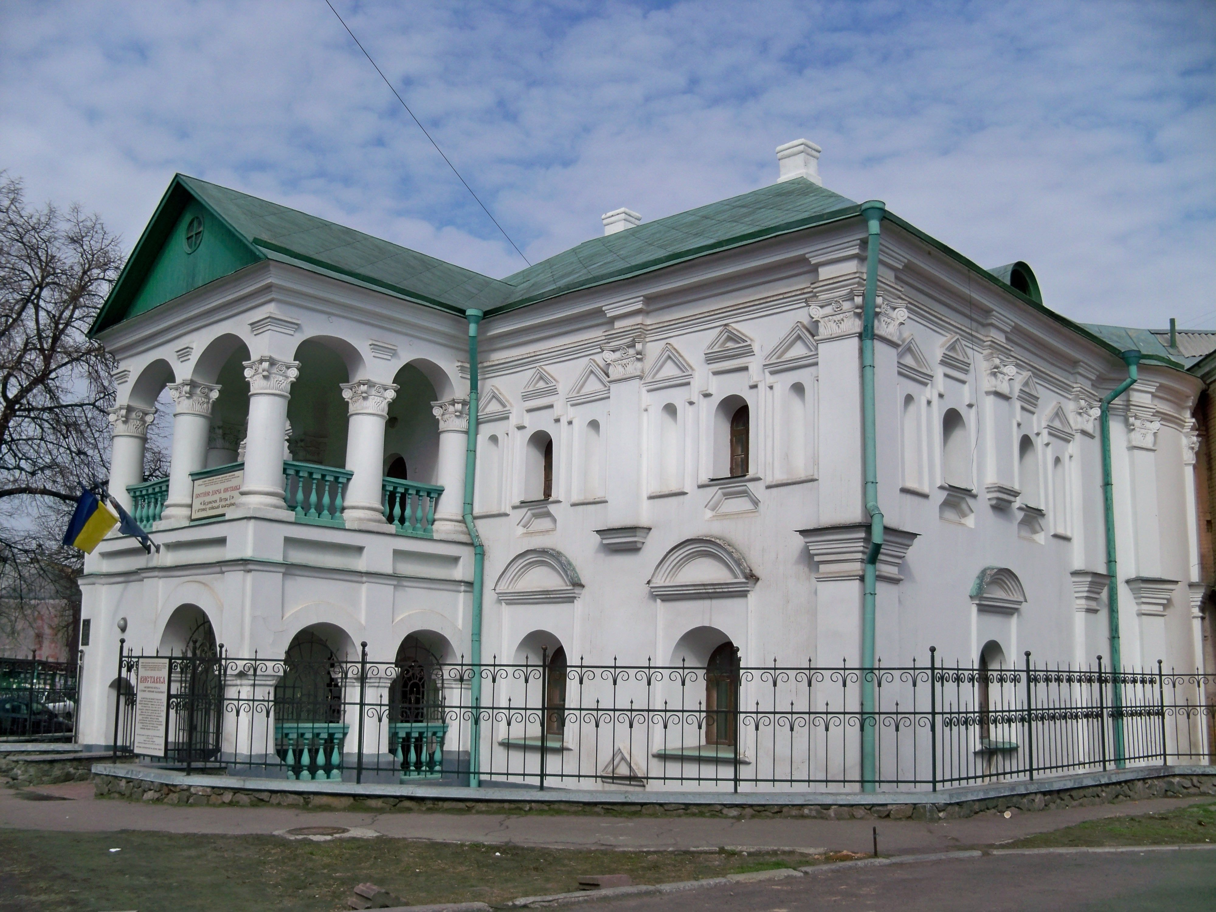 Будинок житловий Я. Биковського (будинок Петра І), Київ, вул. Костянтинівська, 6/8